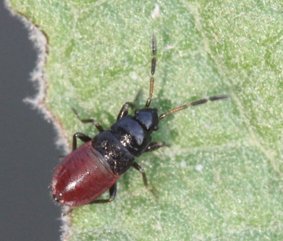 Wanzennymphe Megalonotus praetextatus am 29. Juli 2019 in der Schwetzinger Hardt